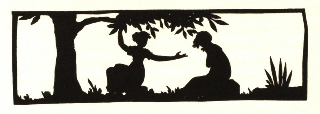 Luise Duttenhofer: Die Versöhnung (1821), schwarzer Scherenschnitt. Eduard Mörike kopierte den Scherenschnitt nach dem Original. Die Kopie sandte er am 25. Mai 1827 aus Köngen in einem Brief an seinen Freund Wilhelm Hartlaub (1804-1885): „Noch eine kleine Beilage ist die schwarze Gruppe die ich nach einer Silhouette der berühmten Madam Duttenhofer in Stuttg[art] gemacht habe, schnell aber getreu. Es ist ein sehr lieblicher Gedanke, soll die Versöhnung zweier Kinder allegorisiren, wovon das Eine, das beleidigt hat, sich vor Schaam und Reue nicht will trösten lassen. Der Baum scheint e[ine] Olive zu sein. Das Ganze, bey so großer Einfachheit – wie alle dergleichen Compositionen dieser äußerst geistreichen Frau – bewundernswürdig!“ (Fiege, Gertrud: Die Scherenschneiderin Luise Duttenhofer, Marbach 1990, Seite 27). Die Holzschnitt-Kopie des Scherenschnitts in dem Gedichtband „Lautentöne“ von Christian Gottlob Vischer zeigt den Originalschnitt seitenverkehrt und an den Seiten verkürzt (siehe Die Versöhnung, Vignette).